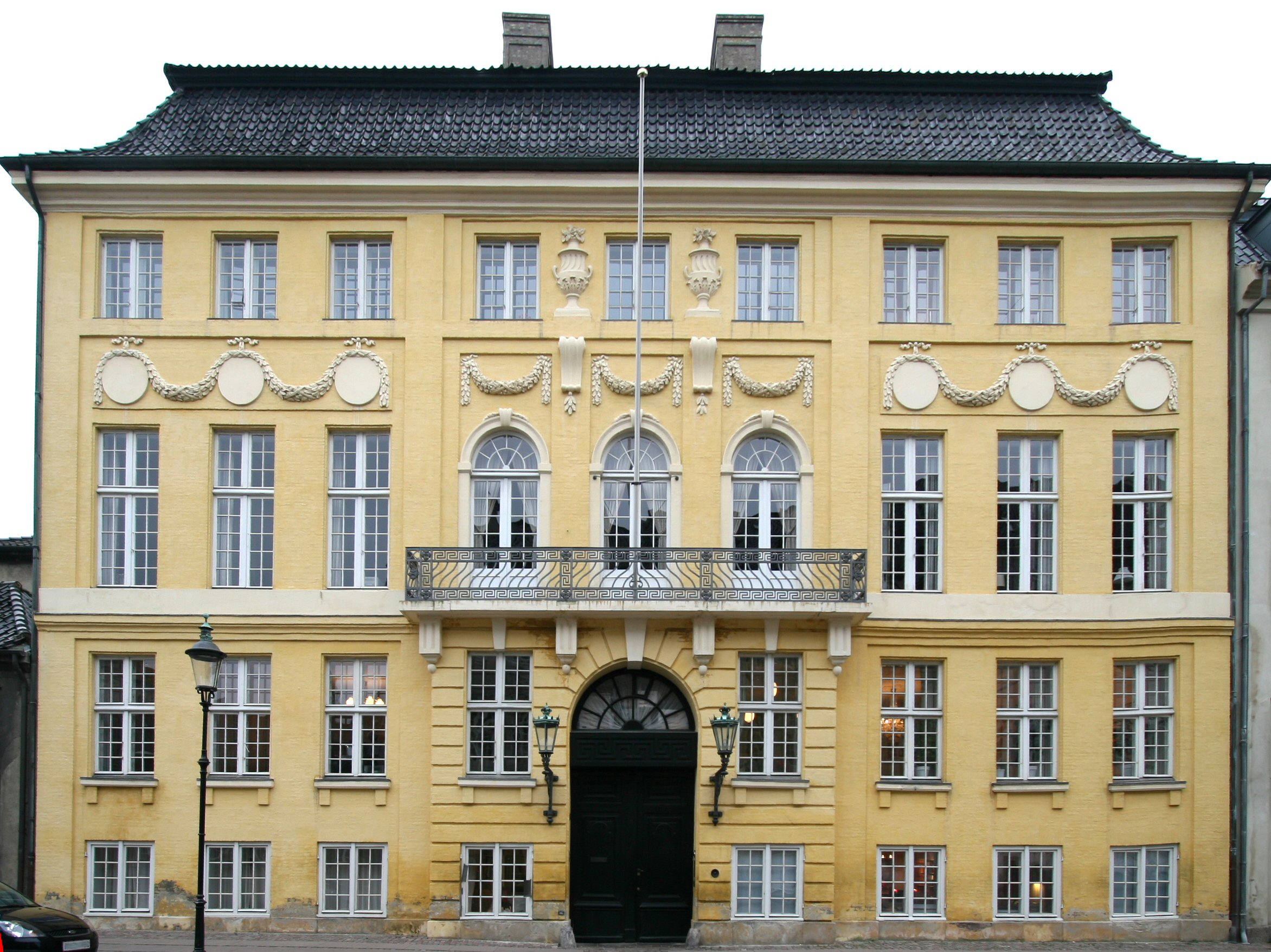 Det Gule Palæ ved Amalienborg, tegnet af Nicolas-Henri Jardin.